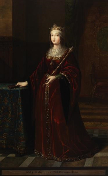 Retrato de la reina Isabel I de Castilla (1451-1504), hija del rey Juan II de Castilla y sucesora de su hermanastro, el rey Enrique IV de Castilla.